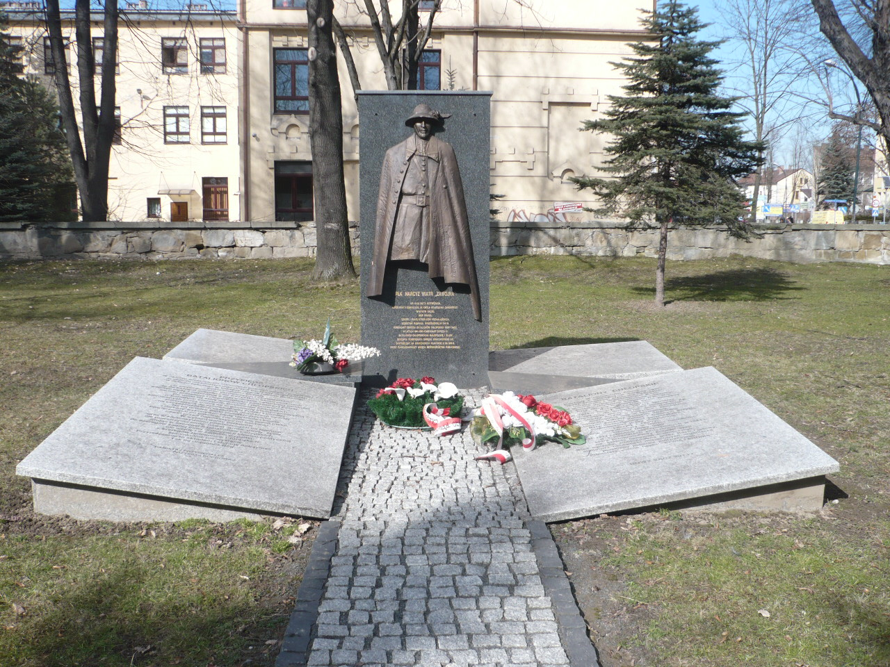 Nowy Sącz, pomnik Narcyza Wiatra_marzec 2015